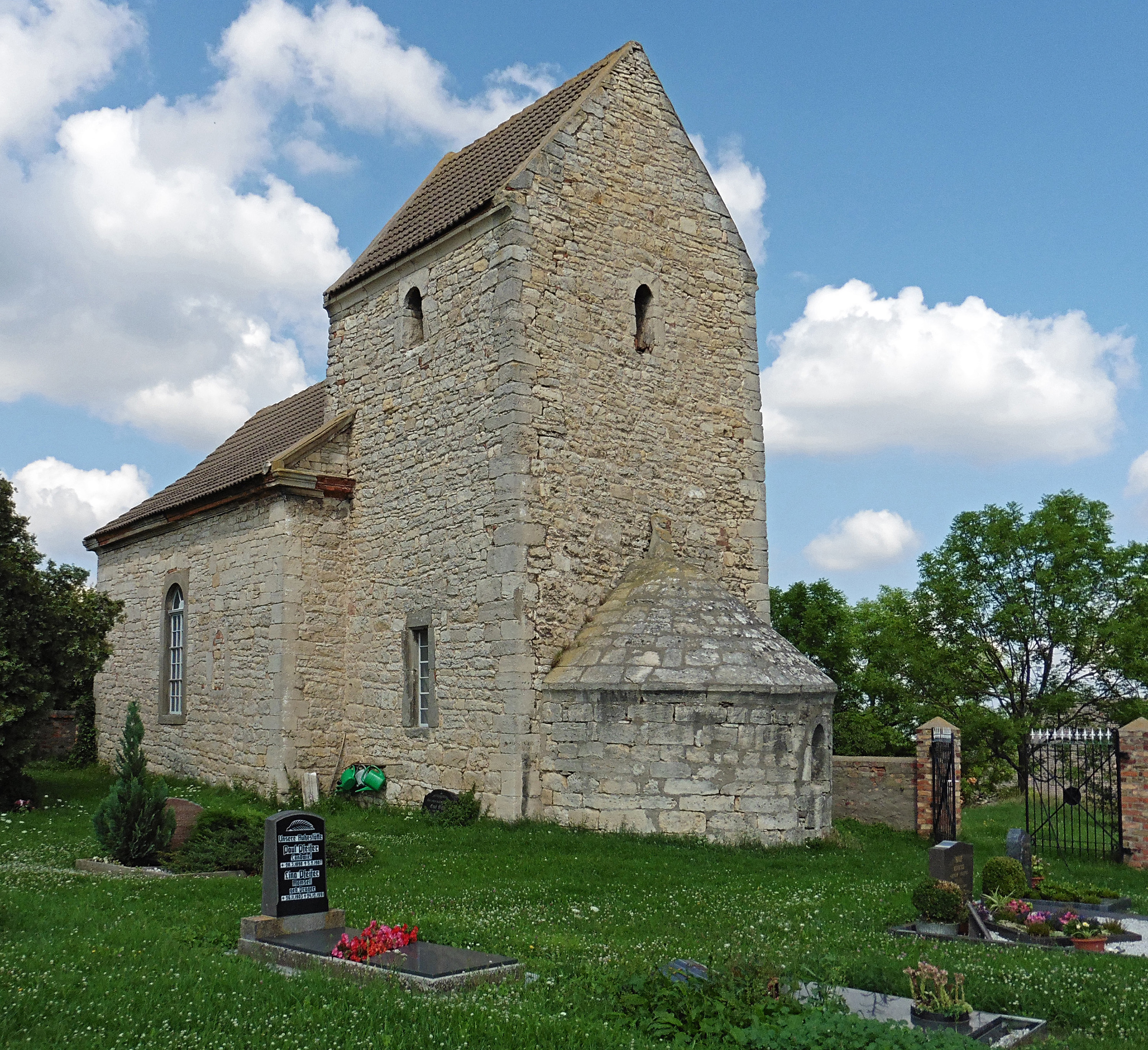 Kirche in Plößnitz bei Laucha an der Unstrut, Sachsen-Anhalt. Ansicht von Südosten.